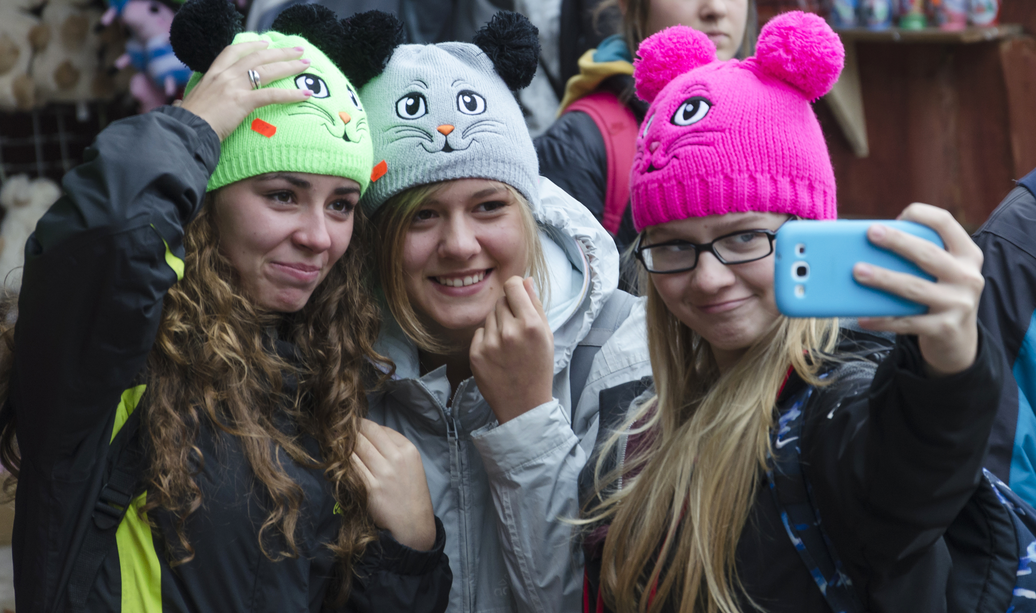 Selfie